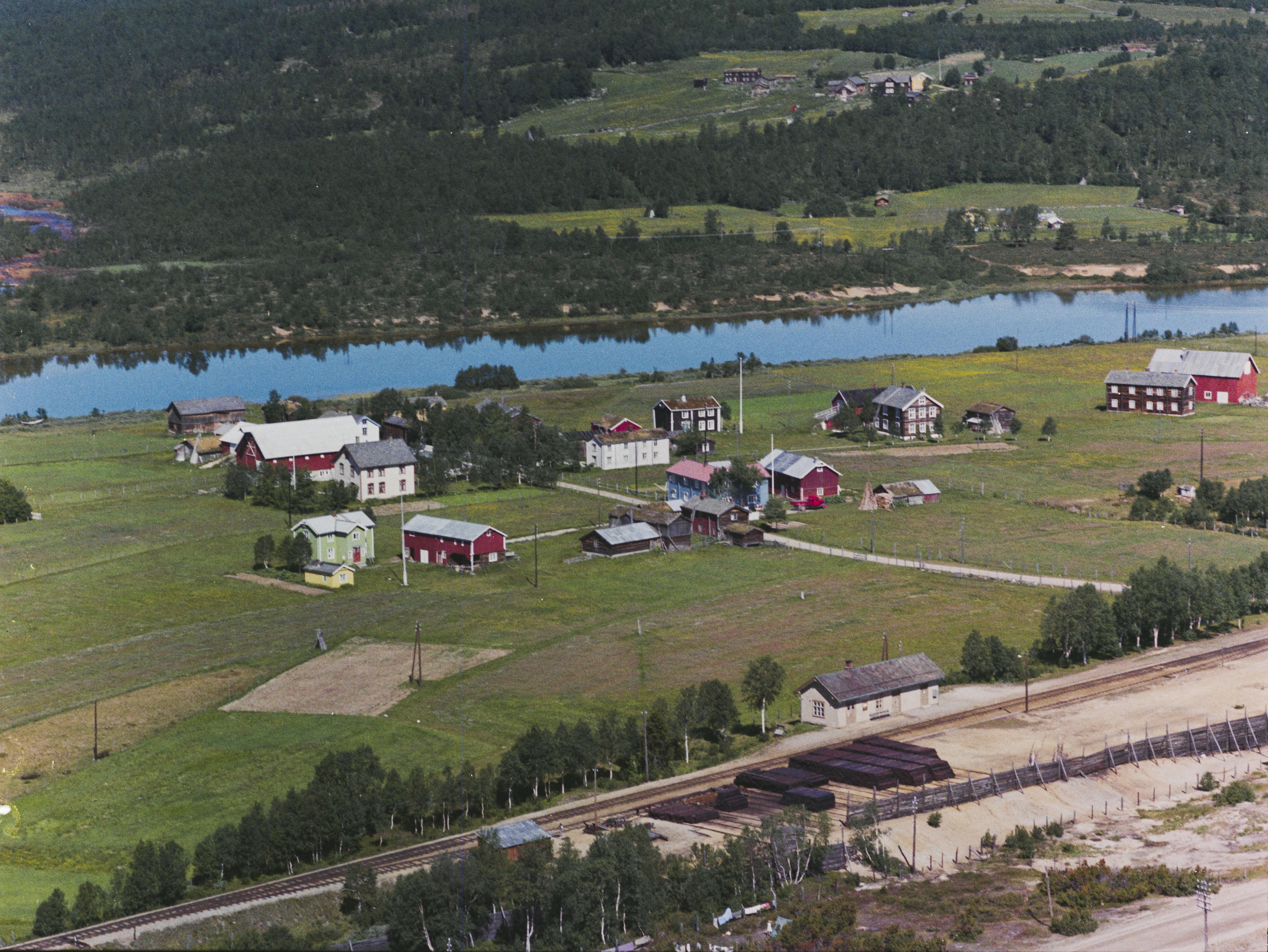 Orvos stasjon på Rørosbanen. Widerøe-bilde fra Nasjonalbibliotekets samling.